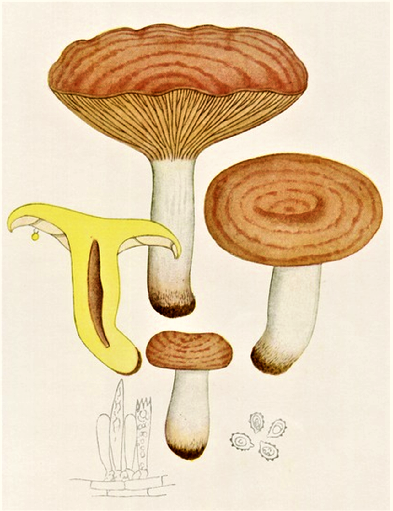 Giacomo Bresadola: 1. Agaricus theiogalus (Bull. (1791), heute Lactarius chrysorrheus Fr. (1838)